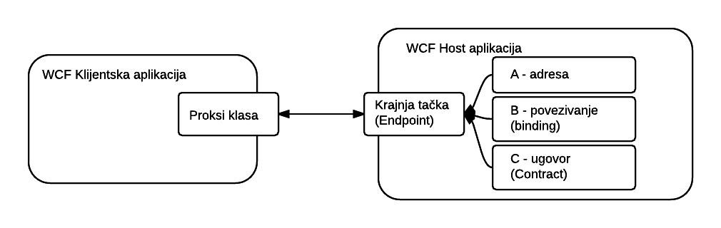 WCF Endpoint dijagram, povezivanje klijenta sa serverom